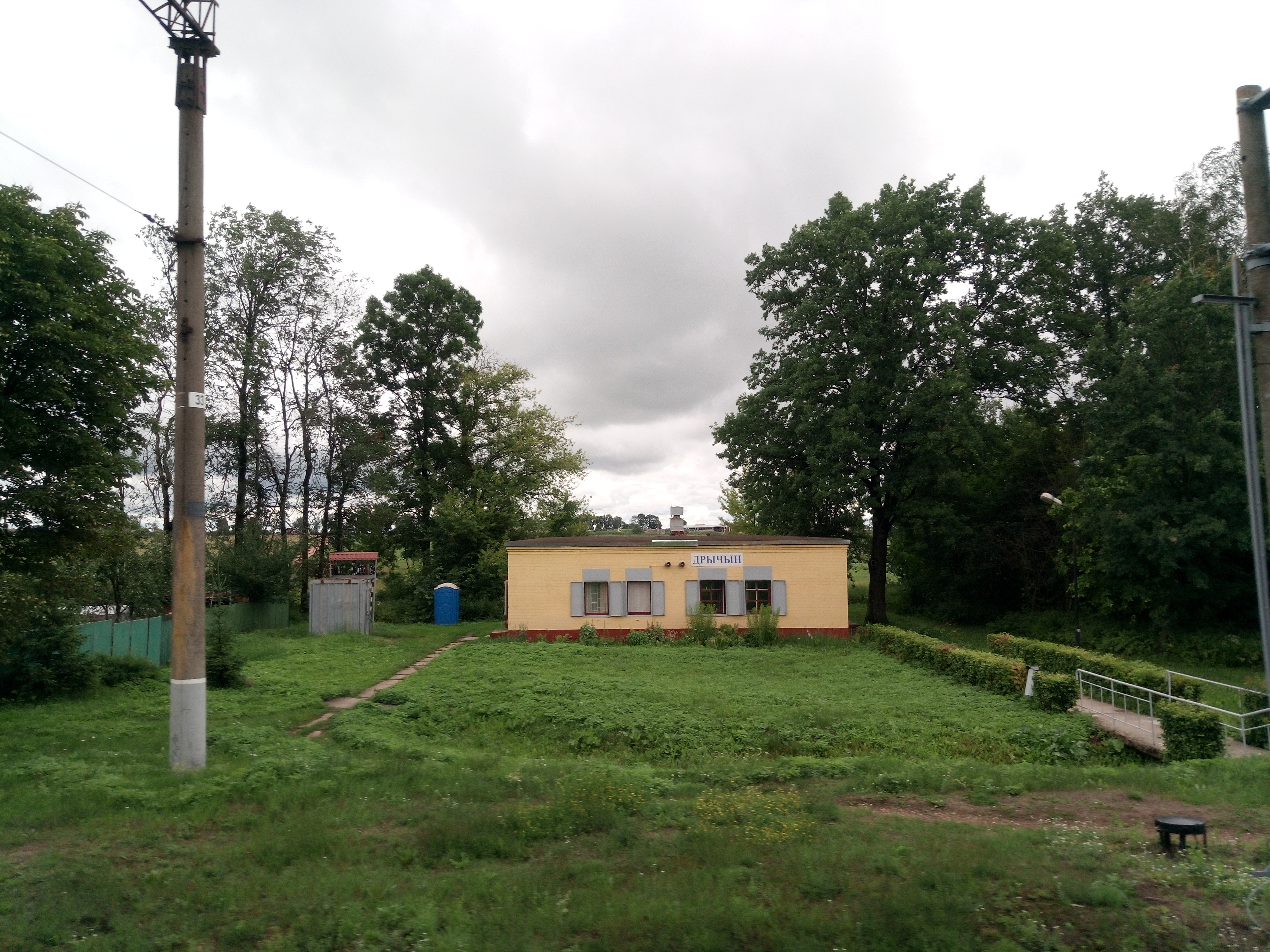 Дрычын (прыпыначны пункт)